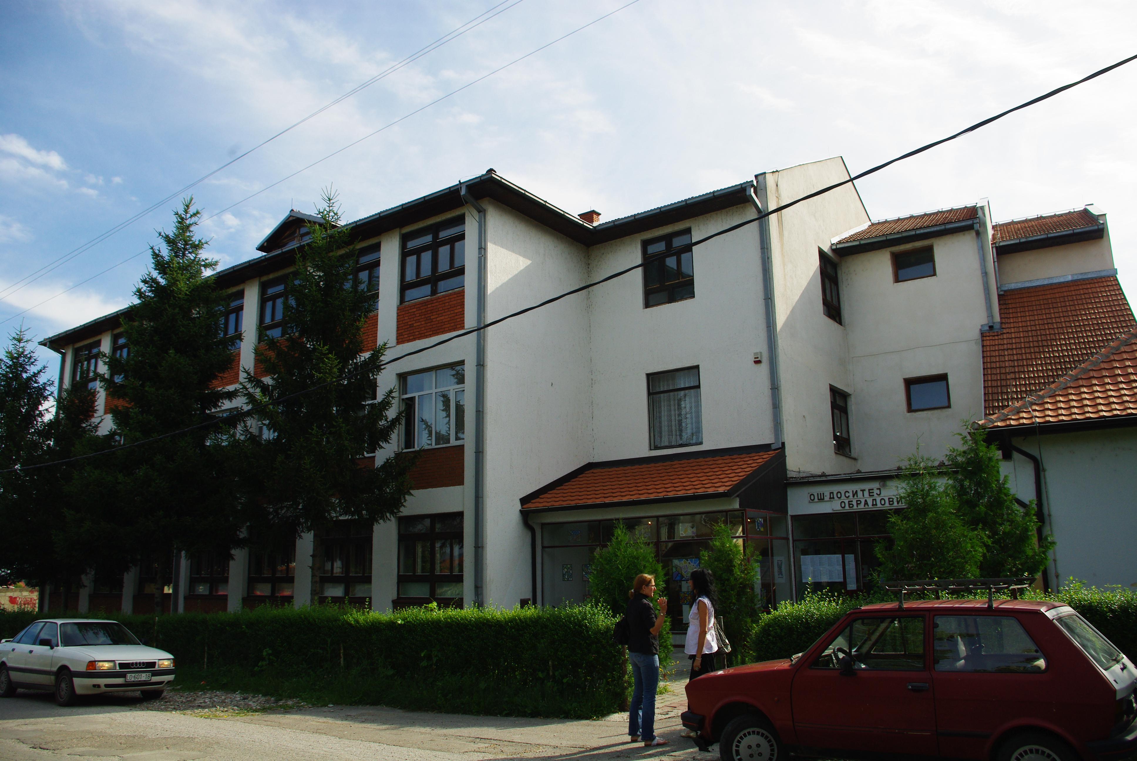 Osnovna skola Dositej Obradovic u Klupcima, Loznica, Srbija.